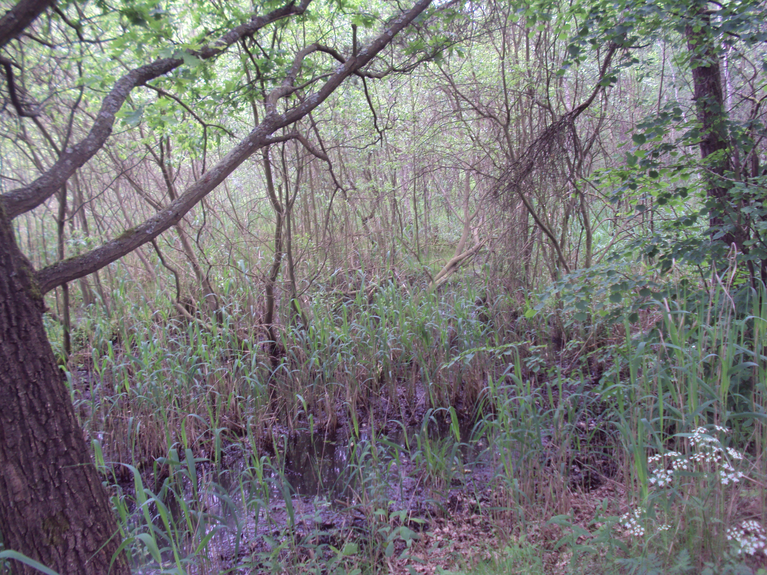 Mokřady jsou také součástí NPP Jestřebské slatiny